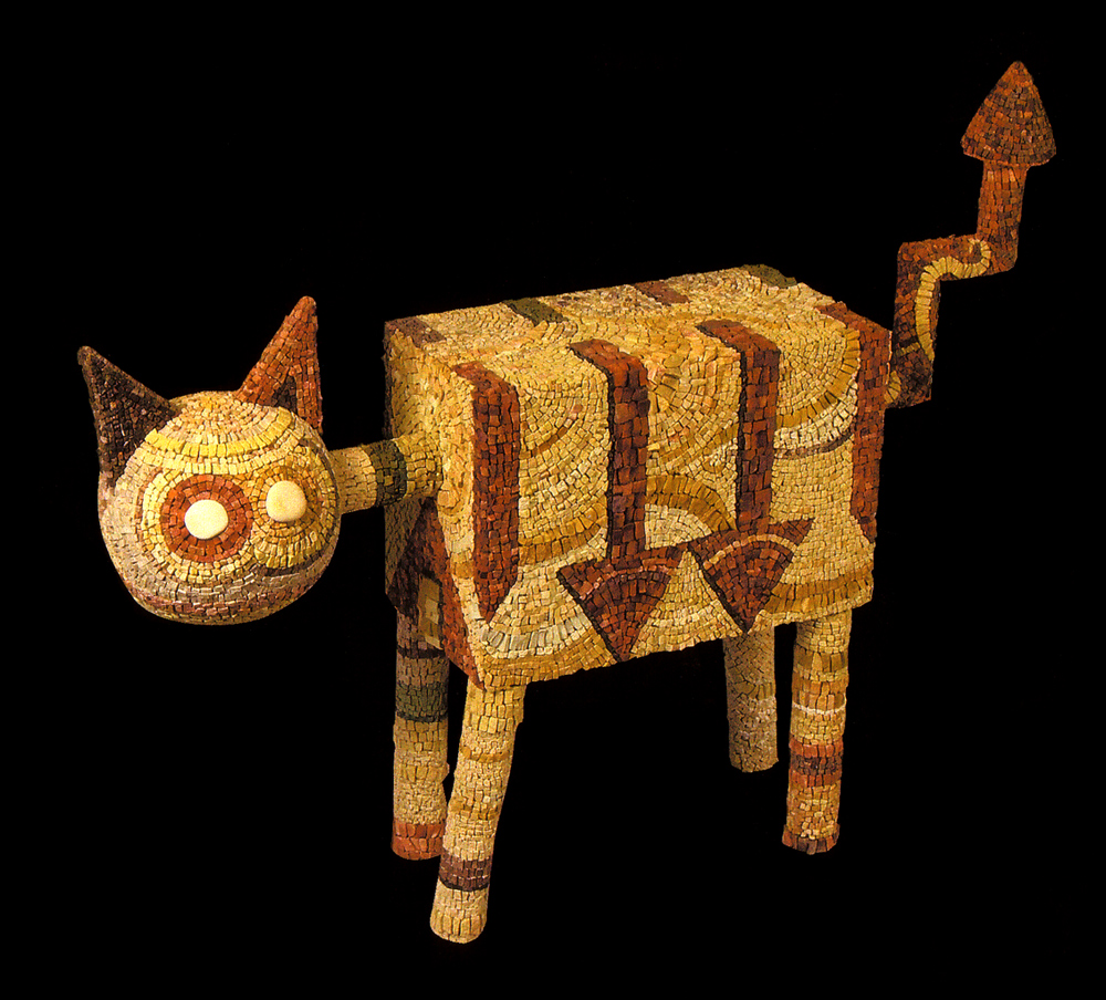 Photo faite par l'artiste lui-même pour l'utilisation libre de la presse, ainsi que des encyclopédies.